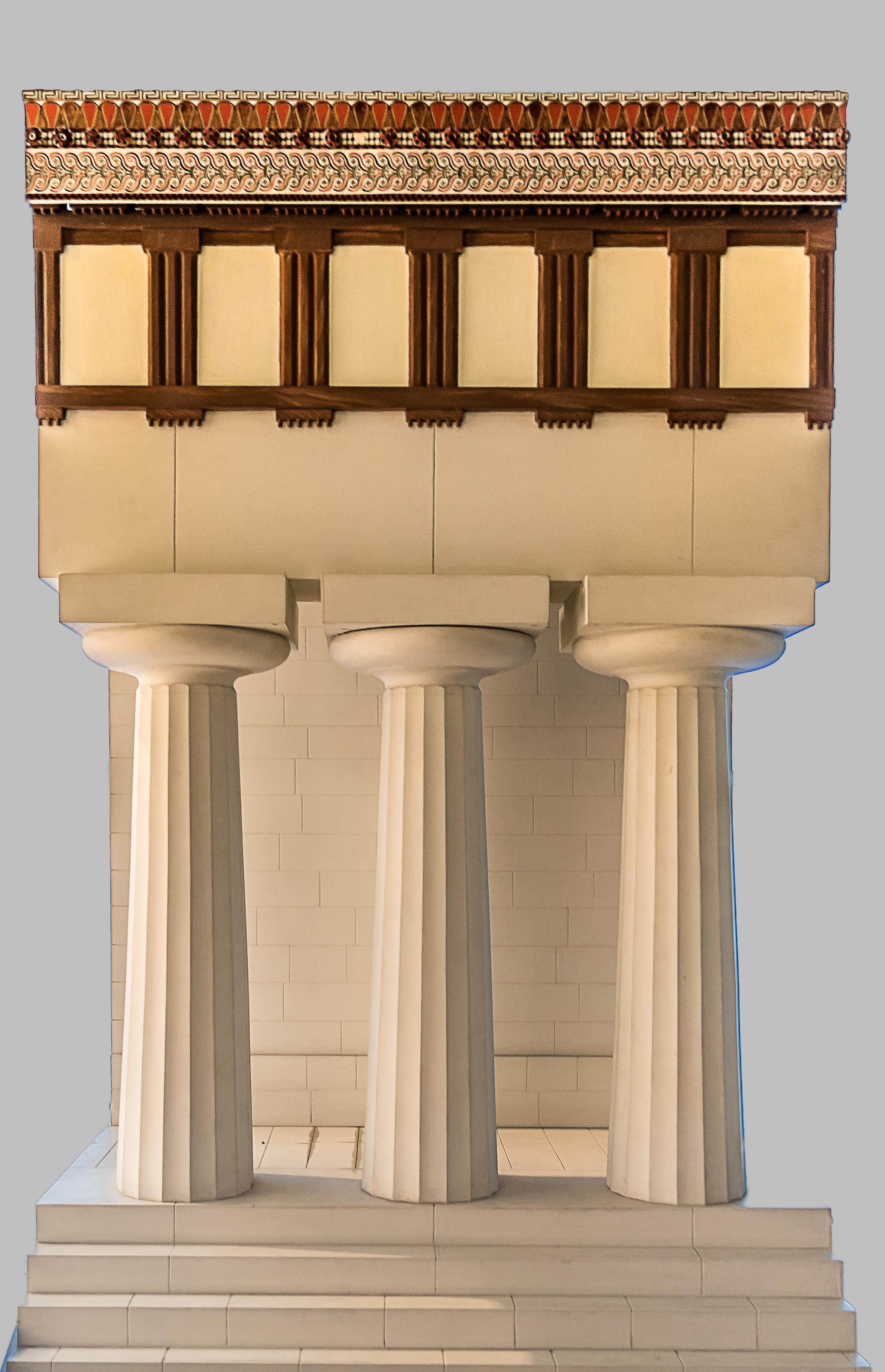 Monolithische Säulen an der Längsseite des Apollontempels in Ortygia. Das Detailmodell veranschaulicht die Holzbalken und Stützen, die für den Fries sowie das Dach verwendet wurden.